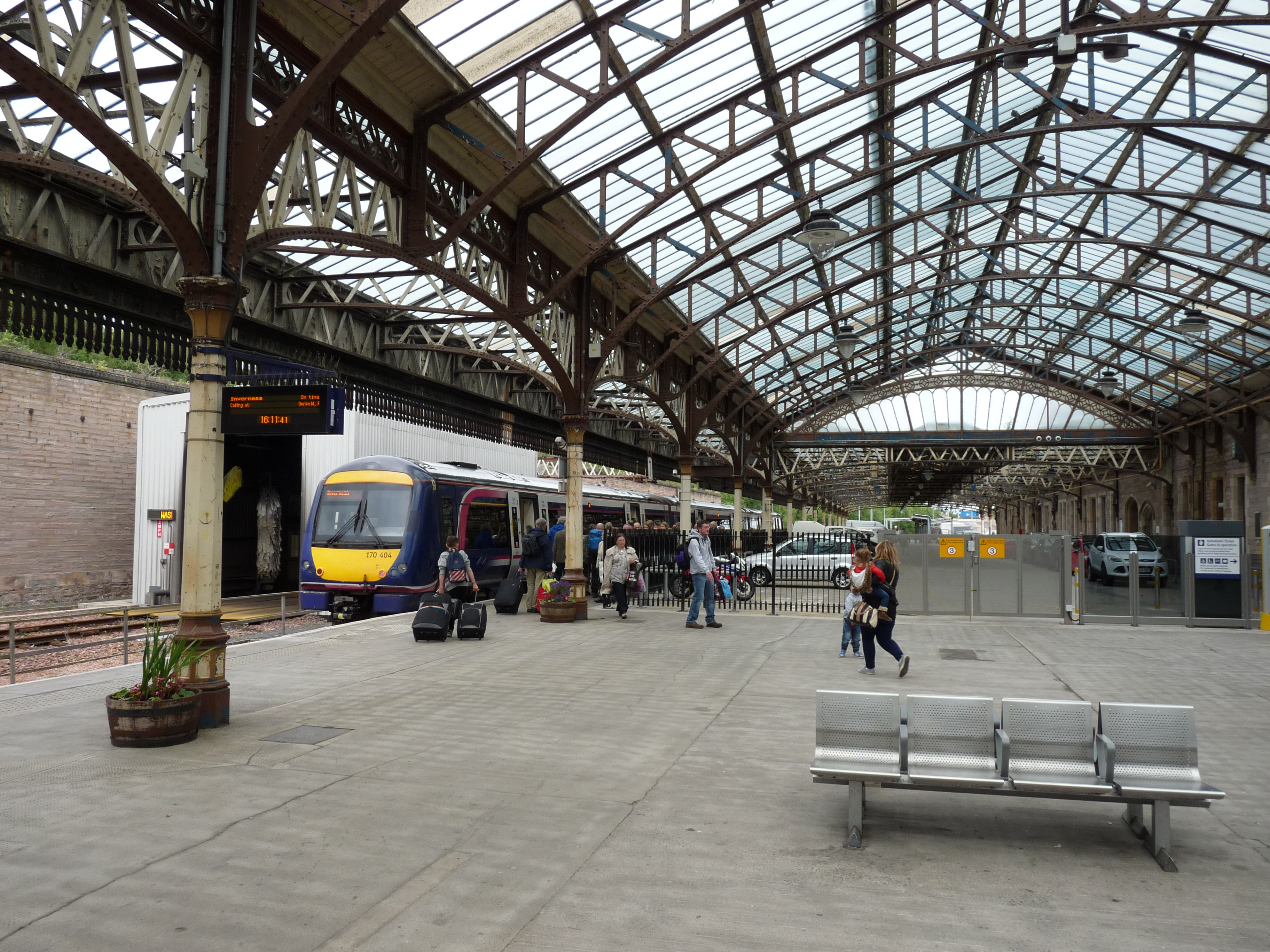 Een trein naar Inverness